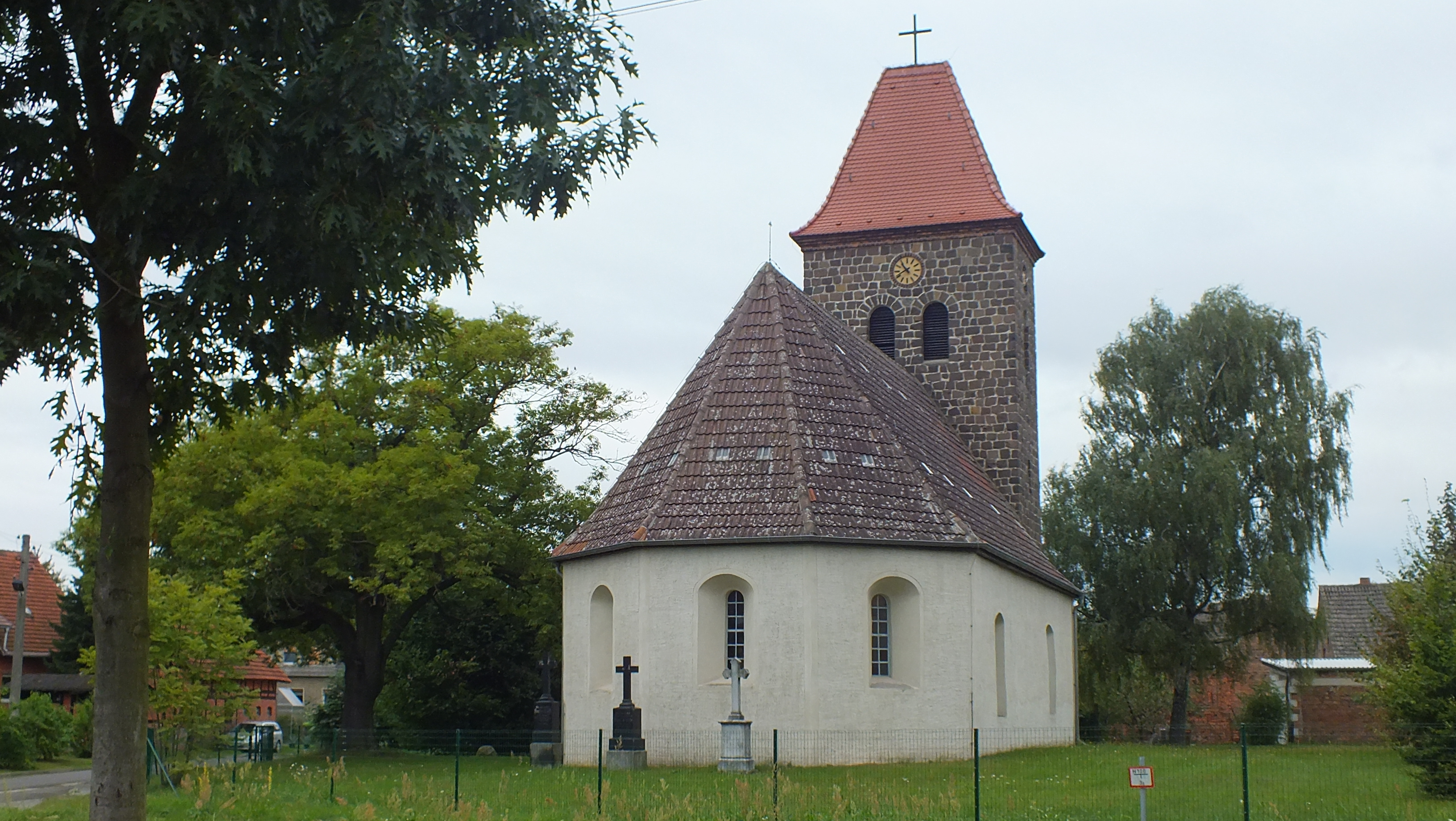 Denkmalgeschützte Kirche in Linda